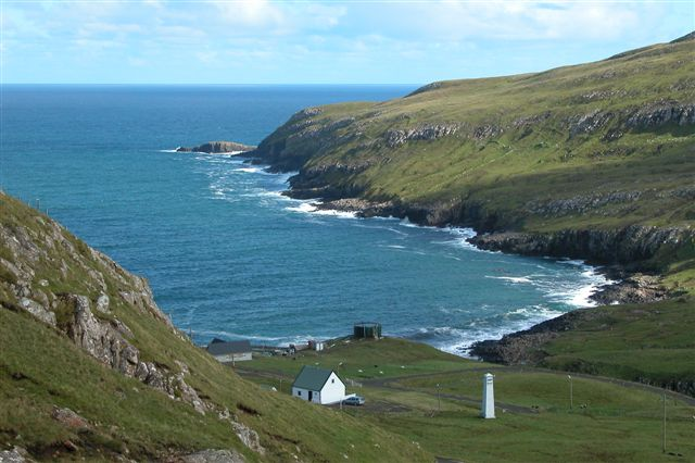 Víkarfjørður